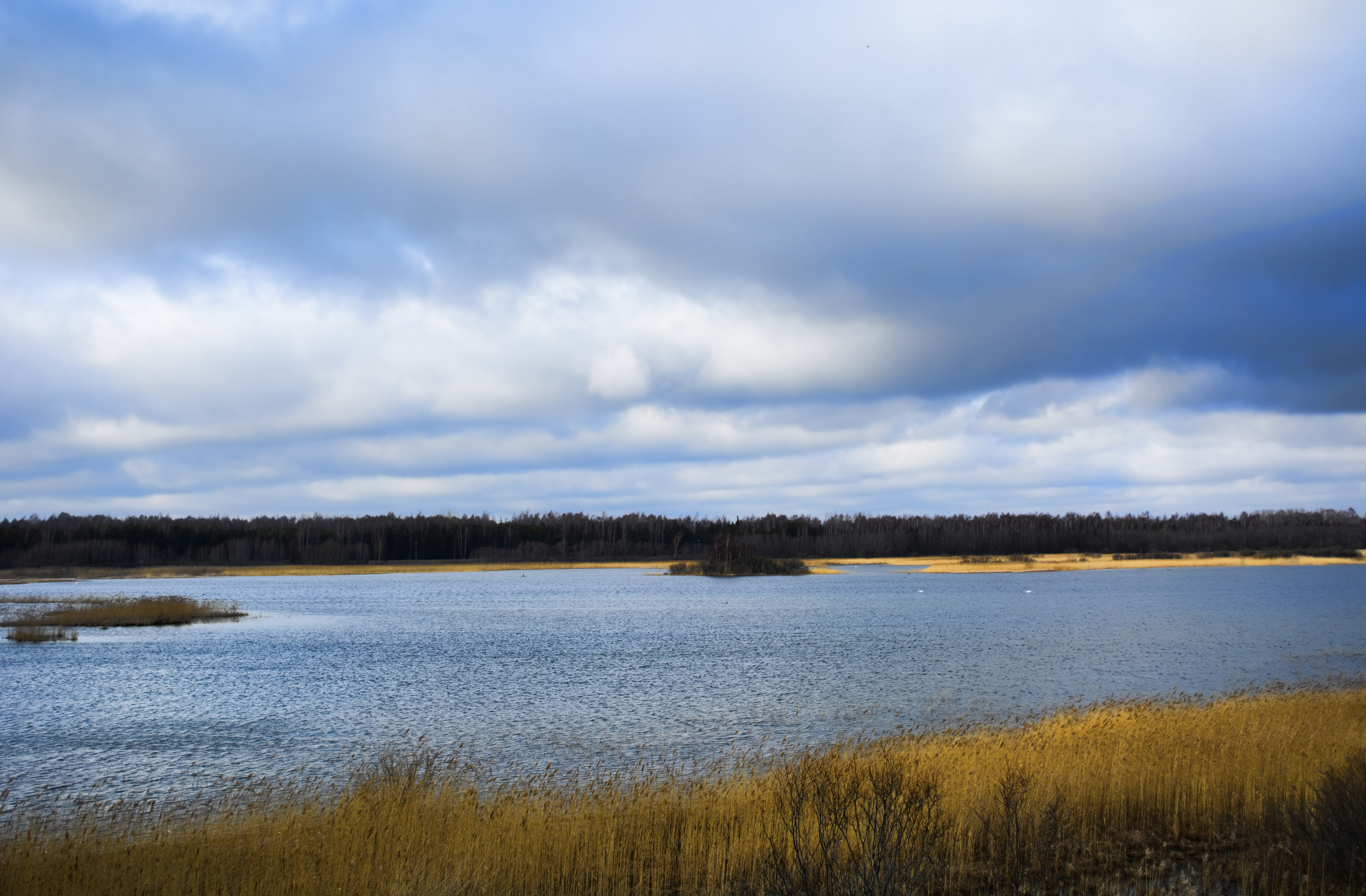 Linnulaht märtsikuus. Pildistatud Linnulahe linnuvaatlustornist.